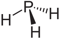 Fosfin gösterimi